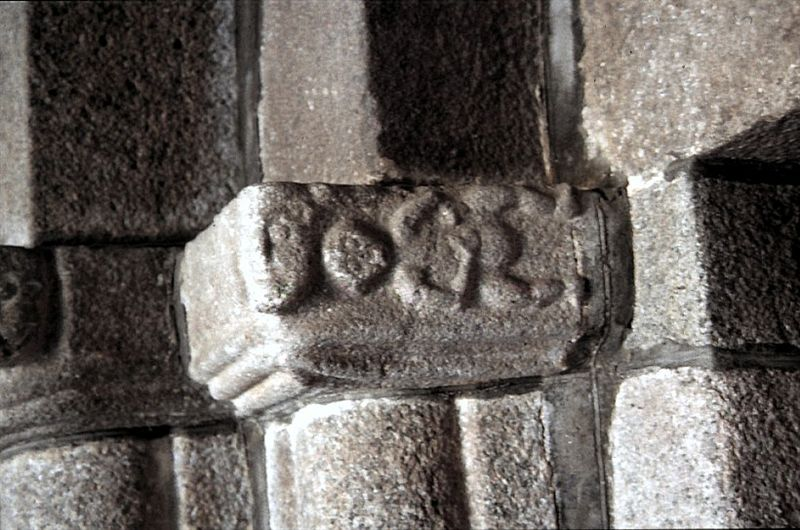 Rybjerg Kirke, (Skive Kommune), Kapitæl mov øst ved nordportalen